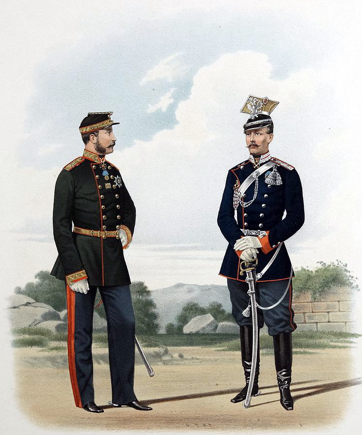 Генералы: состоящий по Легкой Кавалерии и Л.Гв. Уланского Его Величества полка. (Походная форма.) 22 февраля 1868.